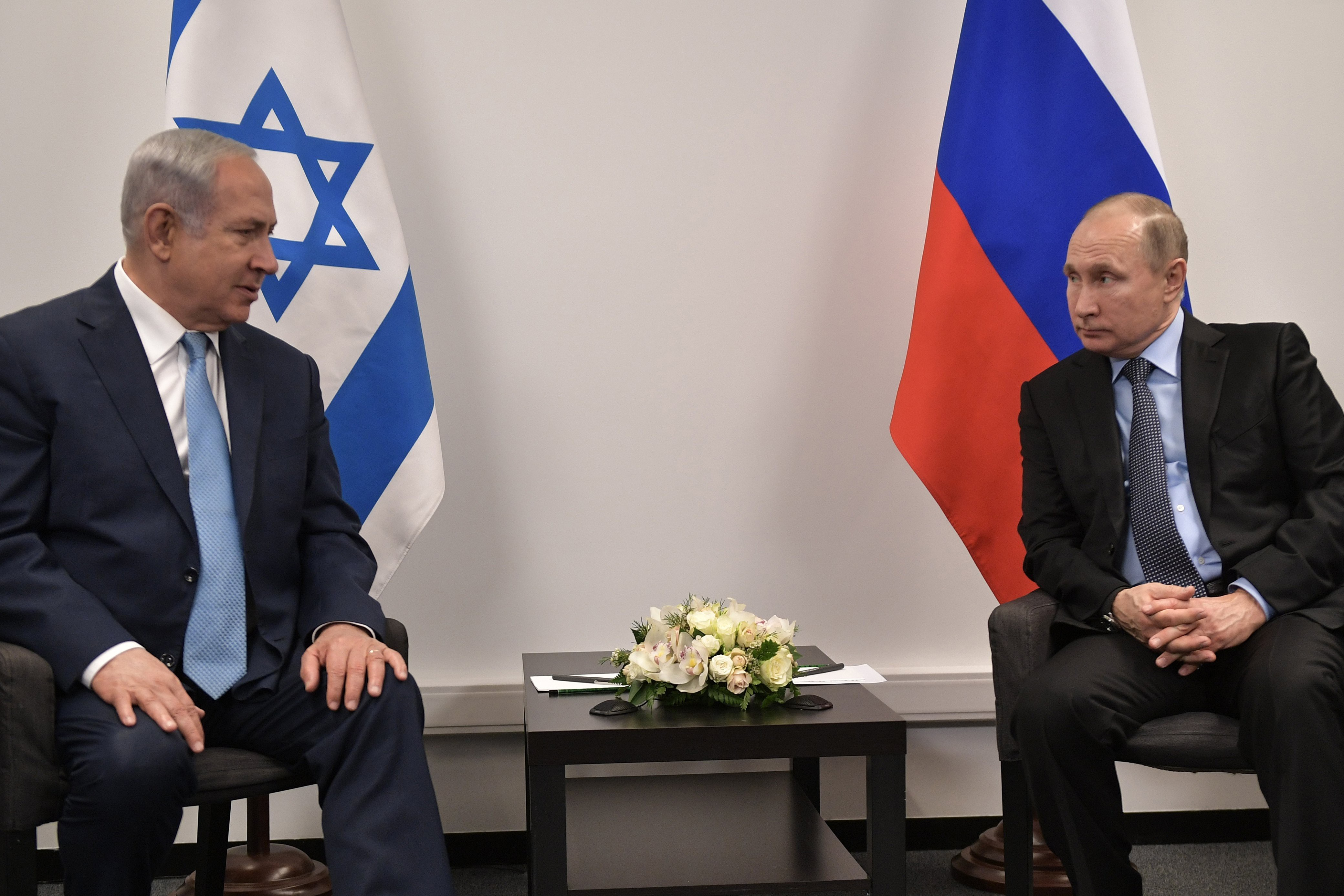 Президент России Владимир Путин с Премьер-министром Израиля Биньямином Нетаньяху